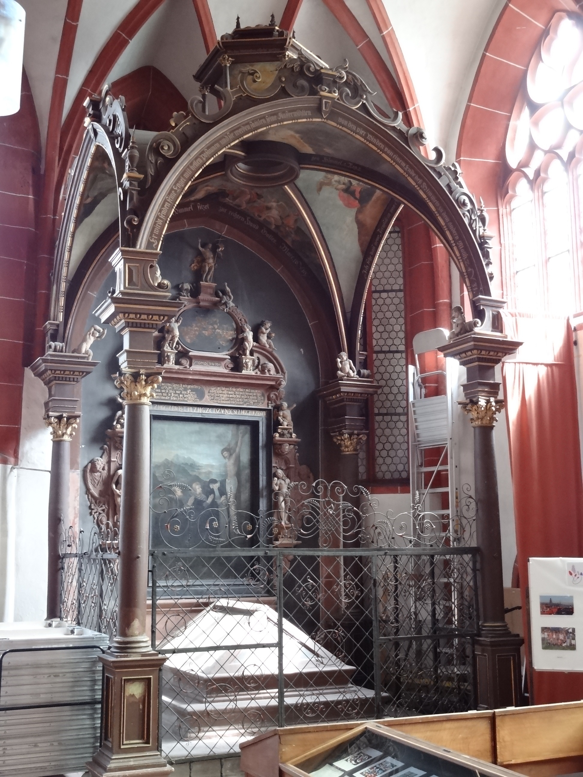 Grabdenkmal Philipp III. von Hessen-Butzbach 23, Markuskirche Butzbach